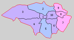 宮城県黒川郡の町村。